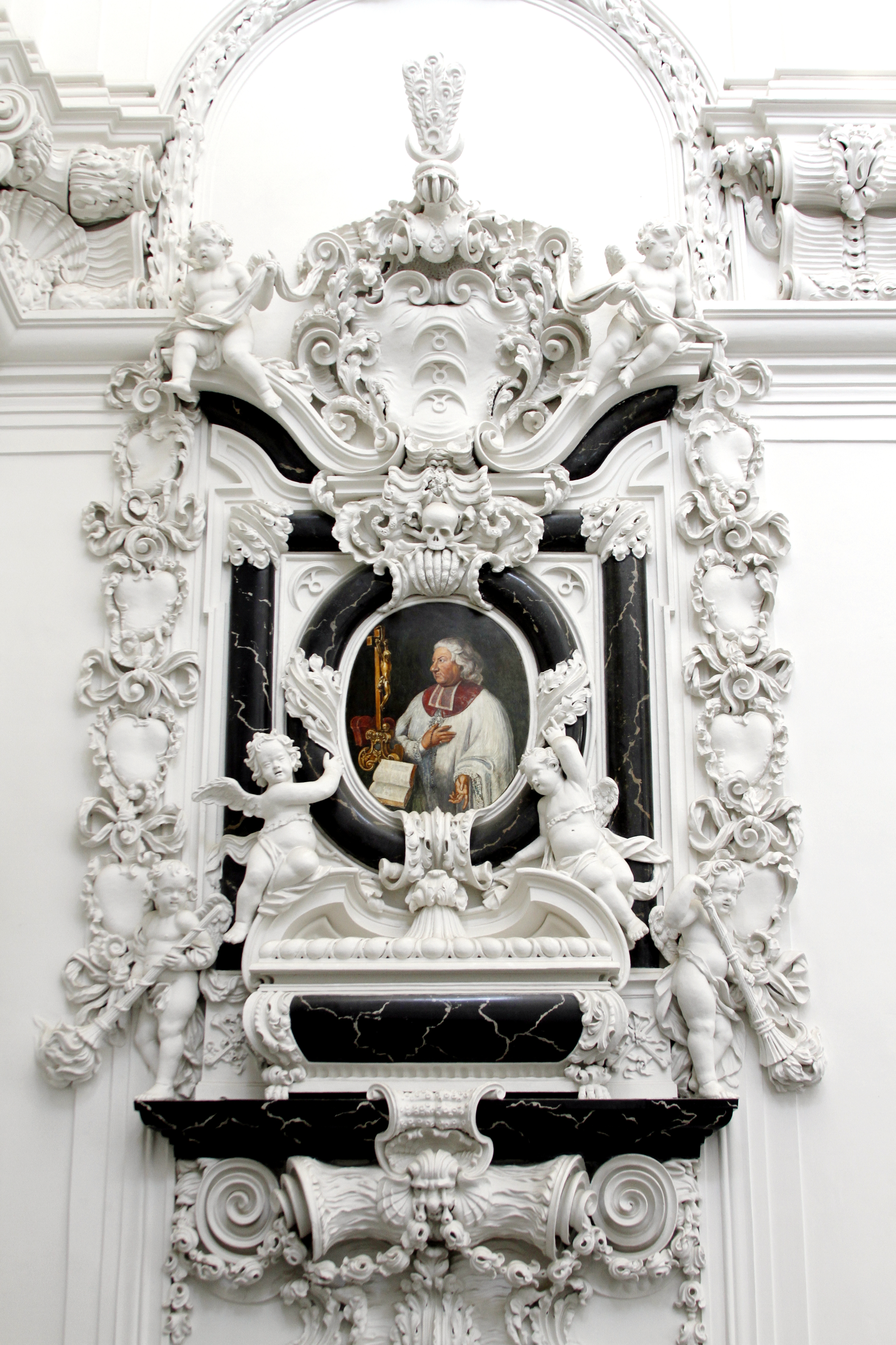 St. Kilian's Cathedral - Würzburg, Epitaph Domdekan Georg Heinrich von Stadion († 1716)